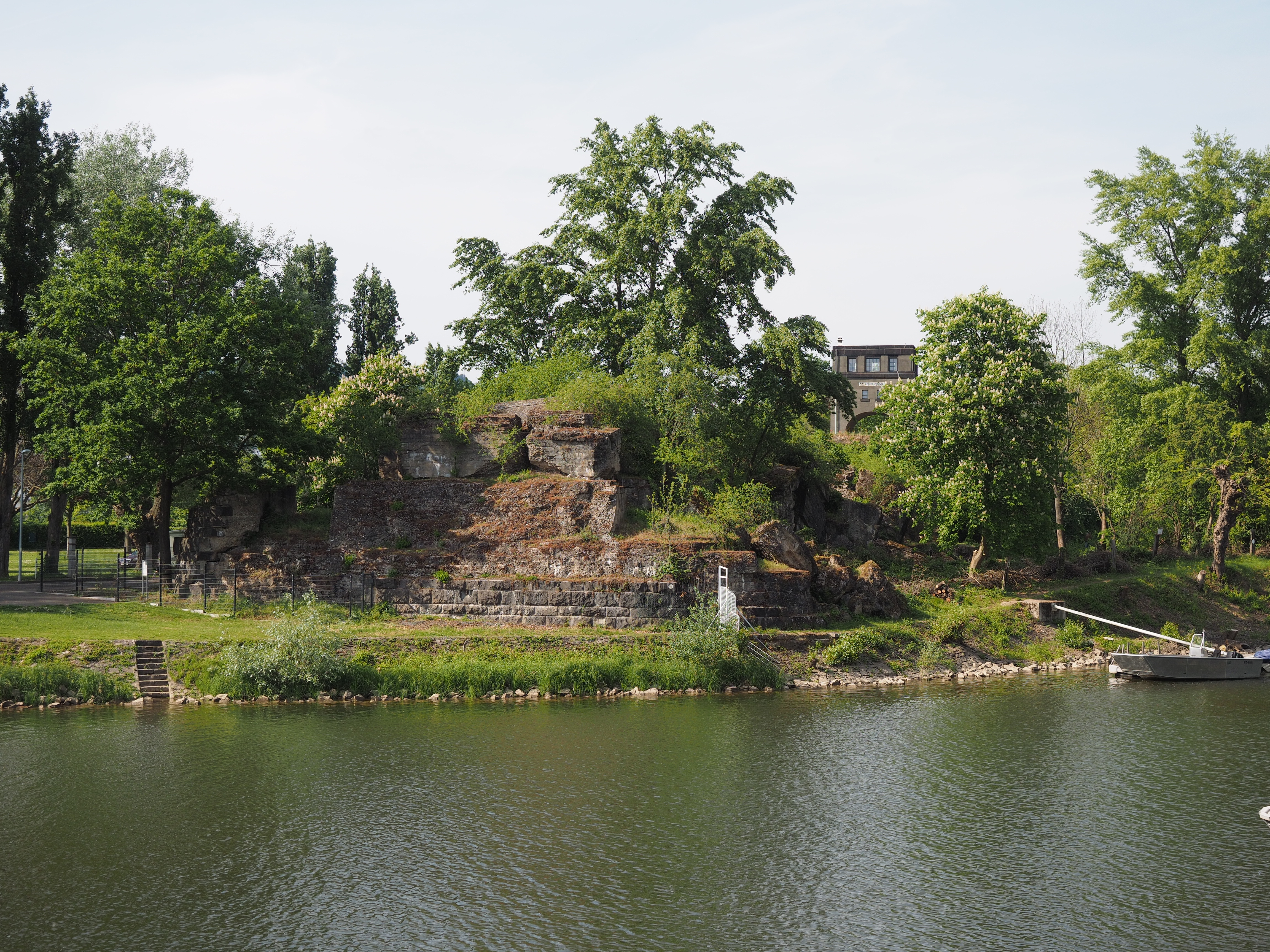 Reste der Hindenburgbrücke auf der rechtsrheinischen Seite bei Rüdesheim